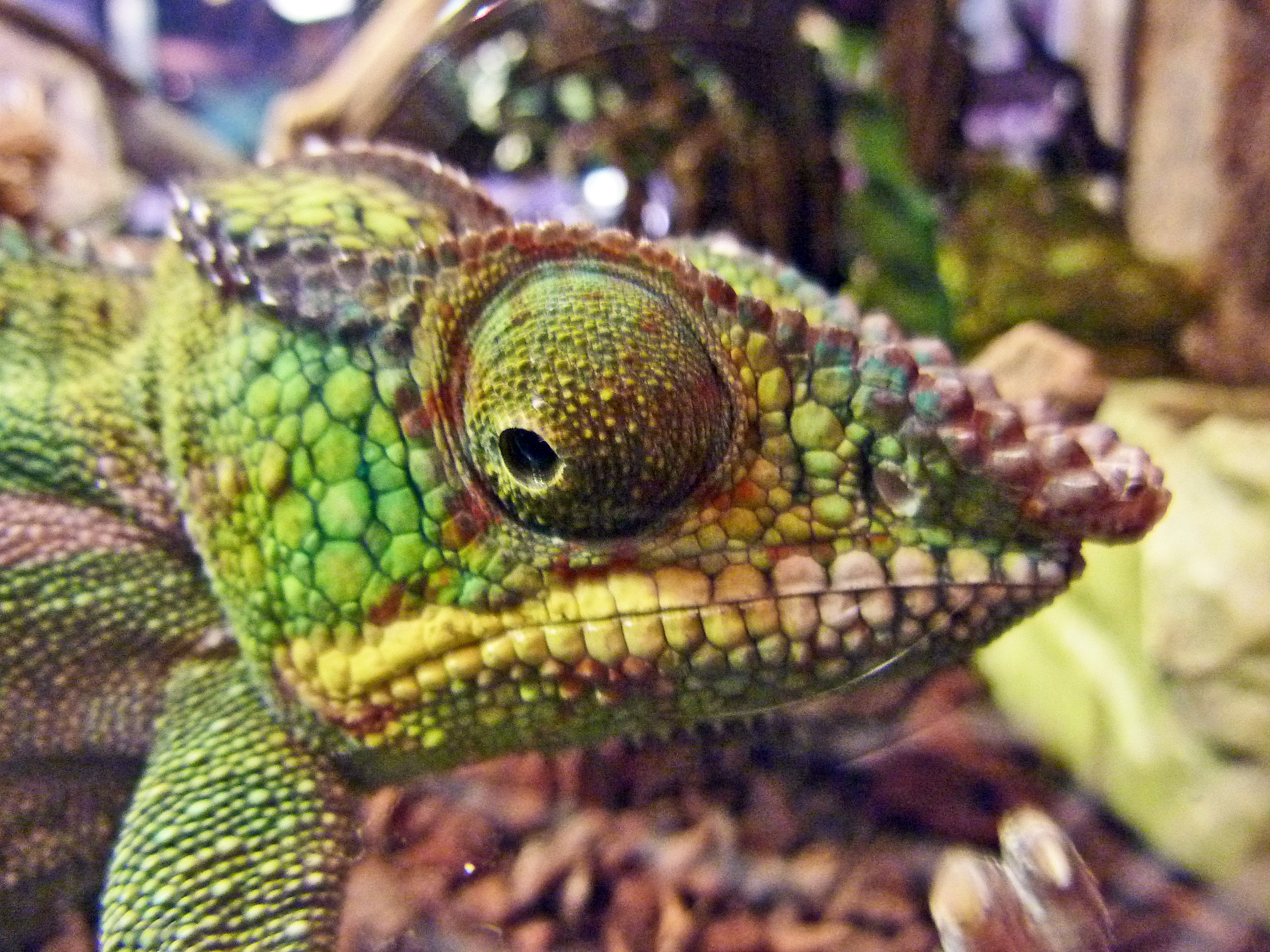 Chamäleon